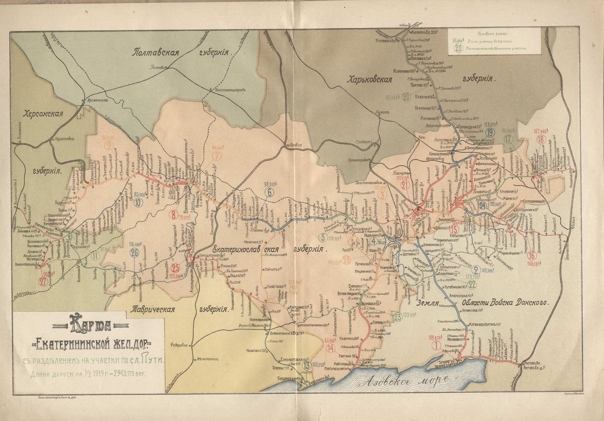 Карта Екатерининской железной дороги